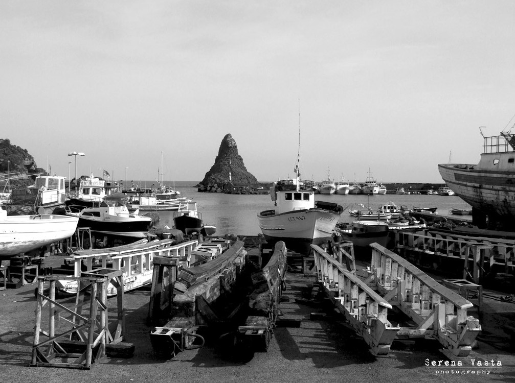 Scivoli nel porto di Aci Trezza, Sicilia – Italia.